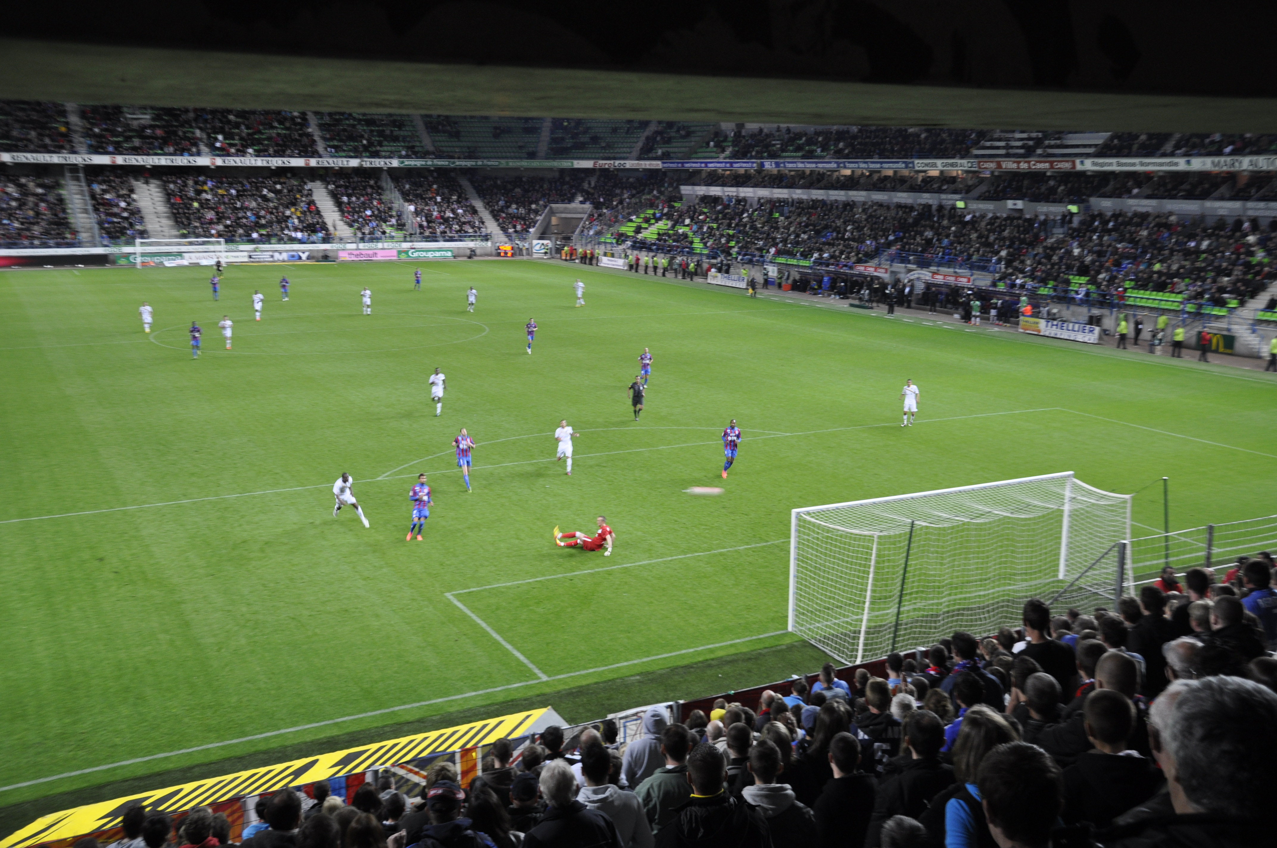 But de Doubai pour Sochaux lors du match contre Caen lors de la 37è journée de championnat de D1 2011-2012